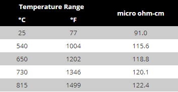 مقاومت